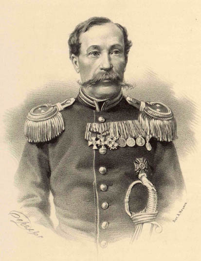 капитан Ф. Э. Штоквич